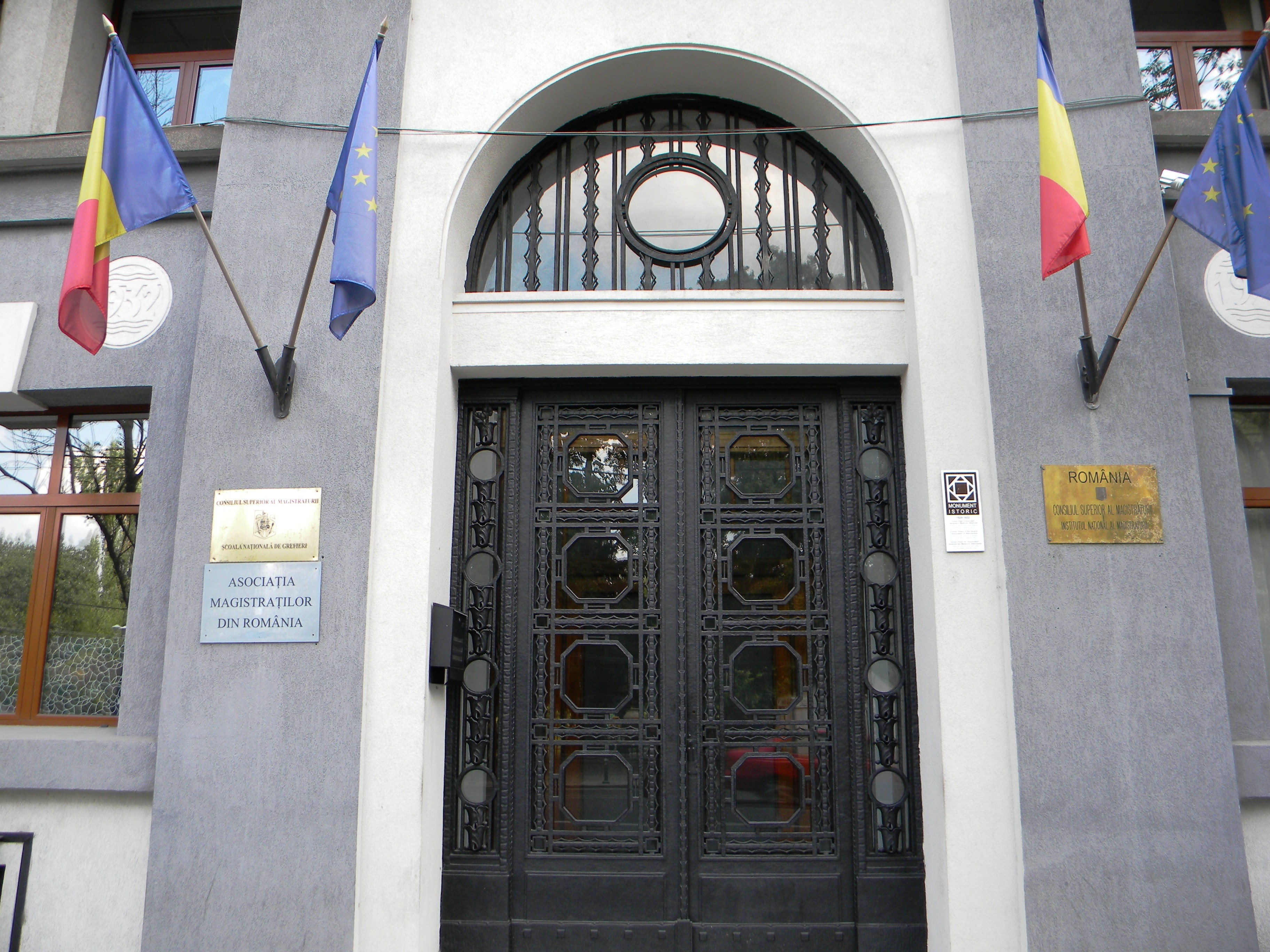 Ministerul Justitiei, Bd. Elisabeta nr. 53, Bucuresti sect. 5. (detail 3)